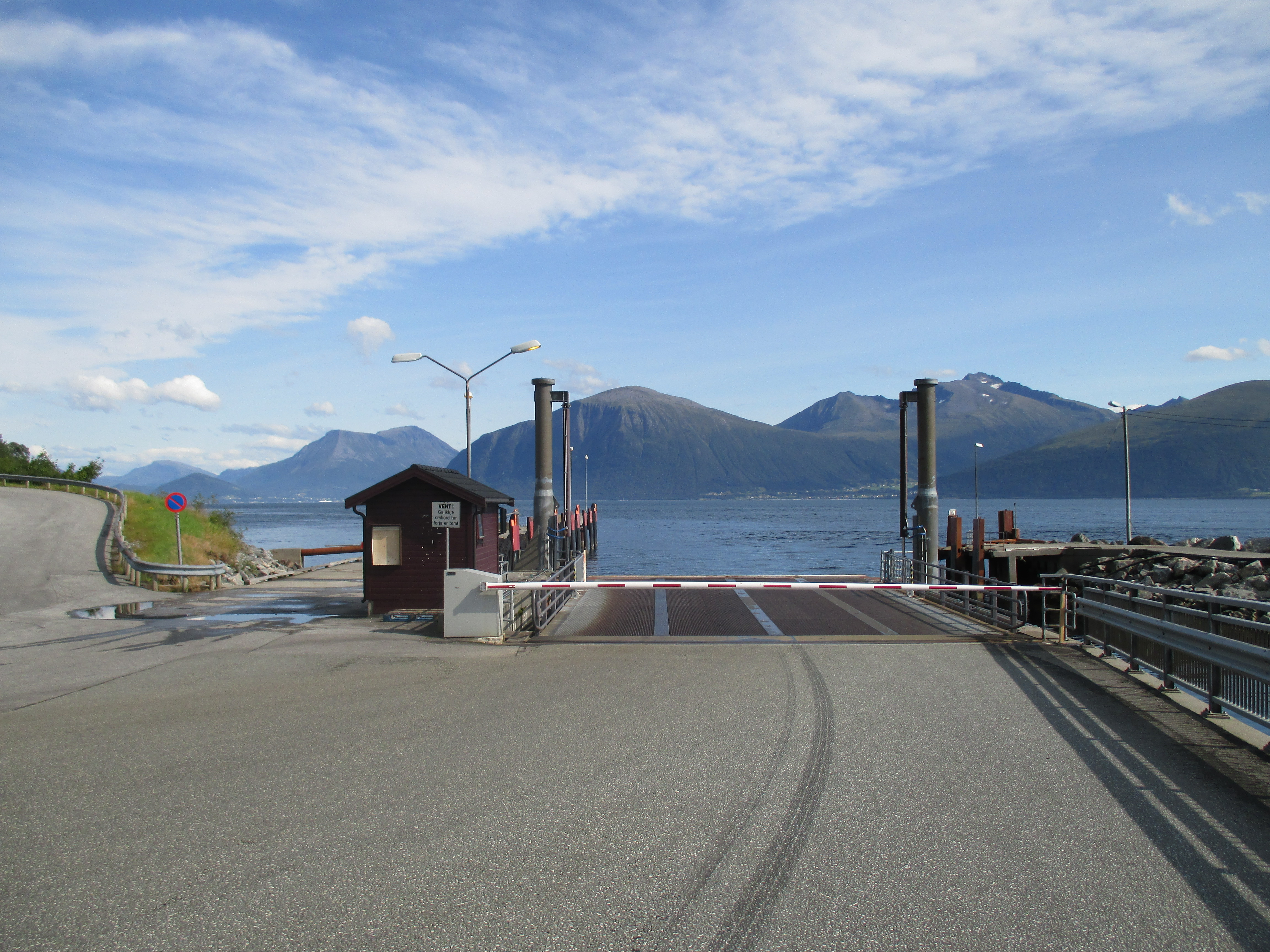 Sulesund fergekai